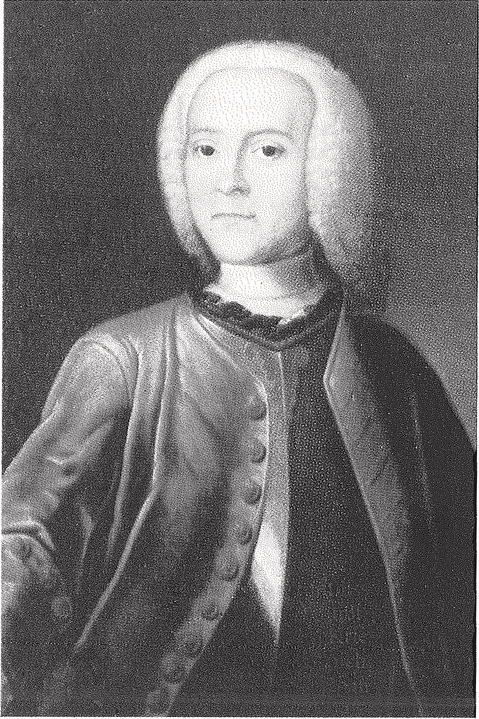 Ludwig Friedrich zu Castell-Remlingen, 1707-1772, Landesherr und Pietist